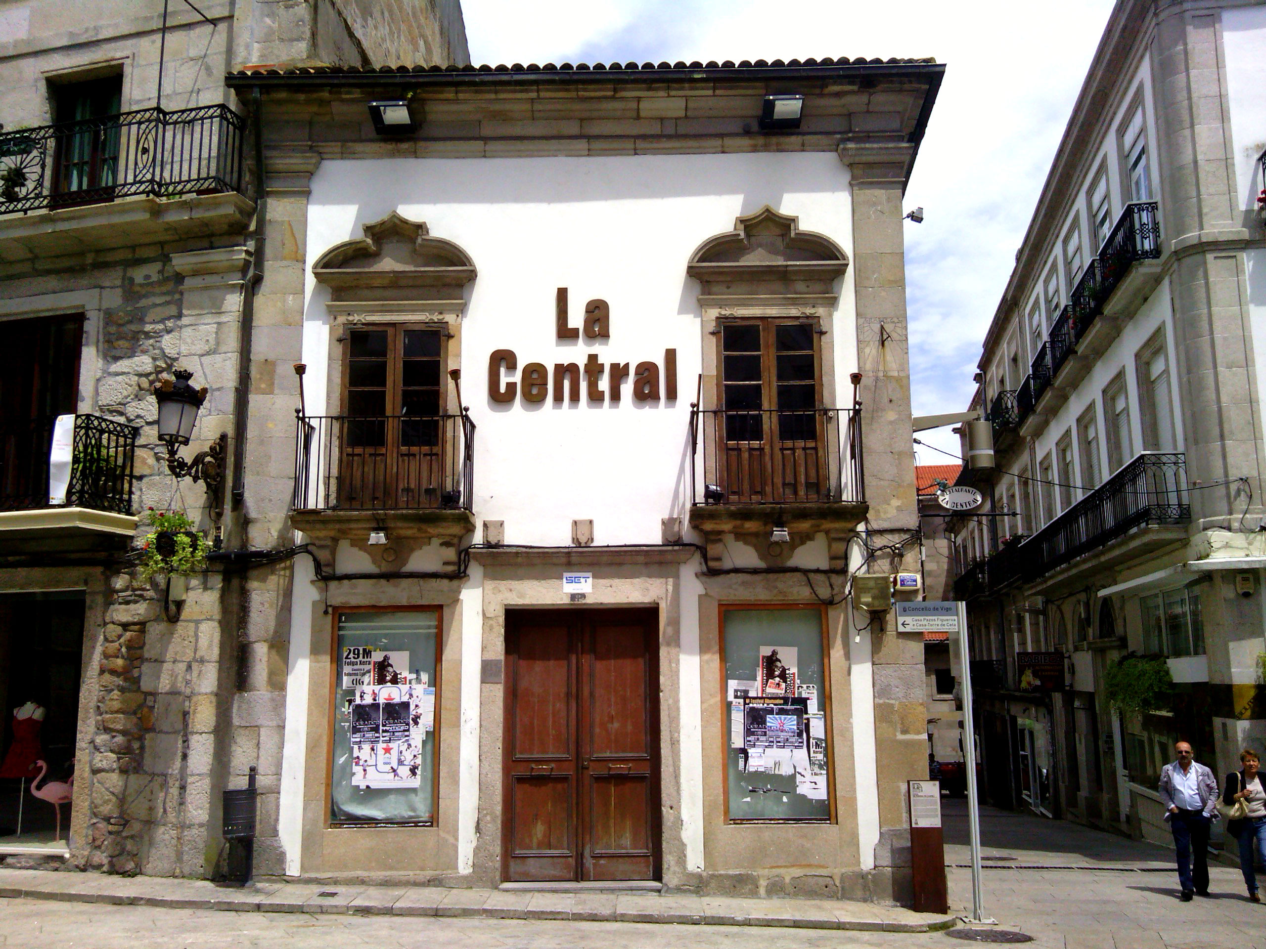 Fachada de la Casa Pereira de Castro en la Praza da Constitución, con la decoración de los vanos y balcones.